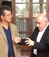 German Santana Perez con Antonio Morales